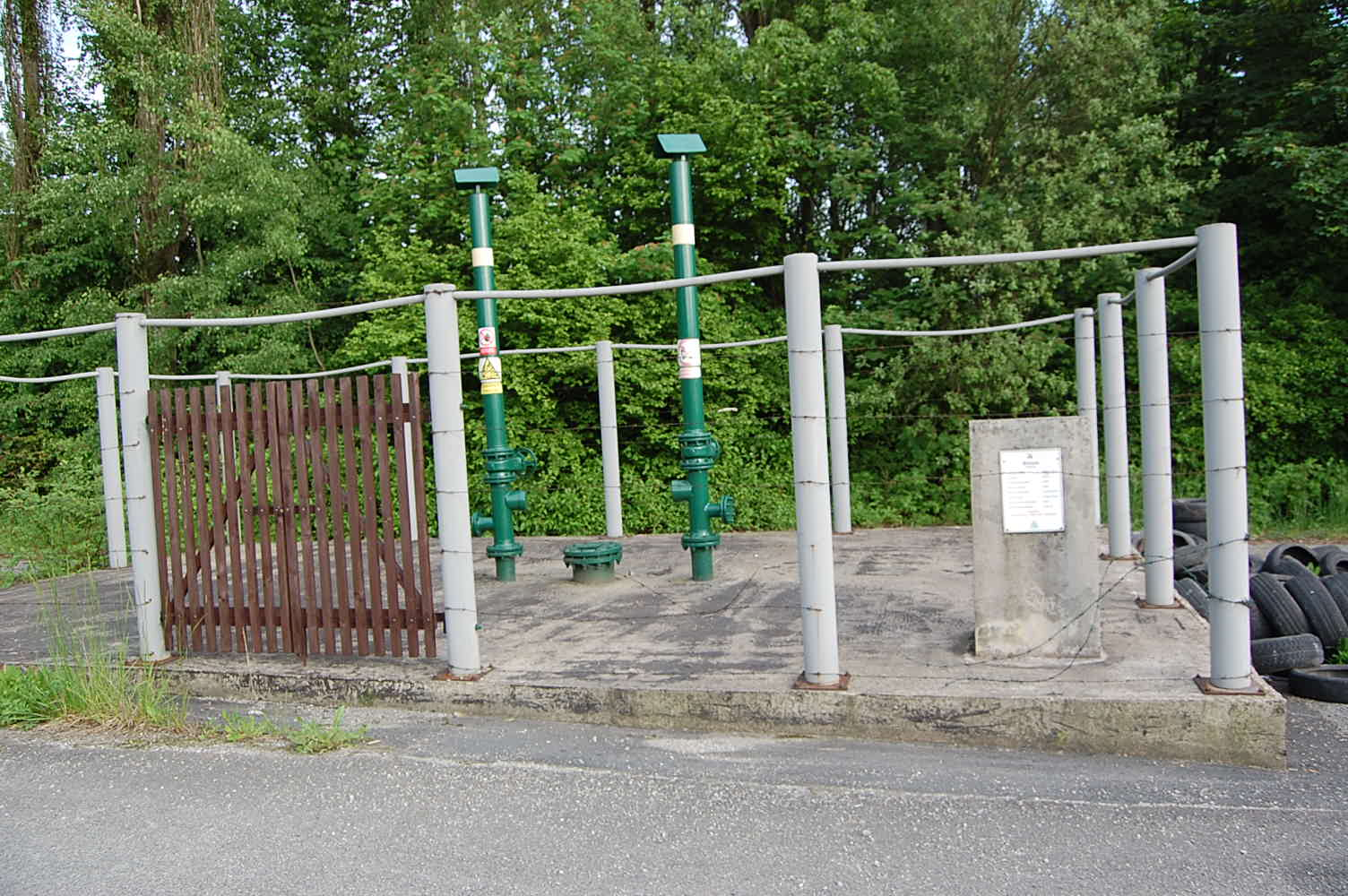 Orlová-Město, jáma Mühsam, místo bývalého černouhelného hlubinného dolu.